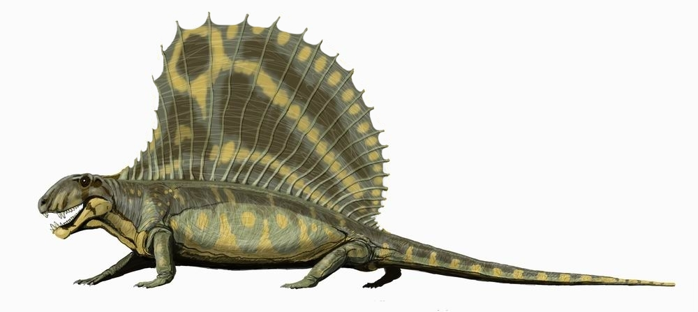 Dimetrodon giganhomogenes, autor - Bogdanov,2006